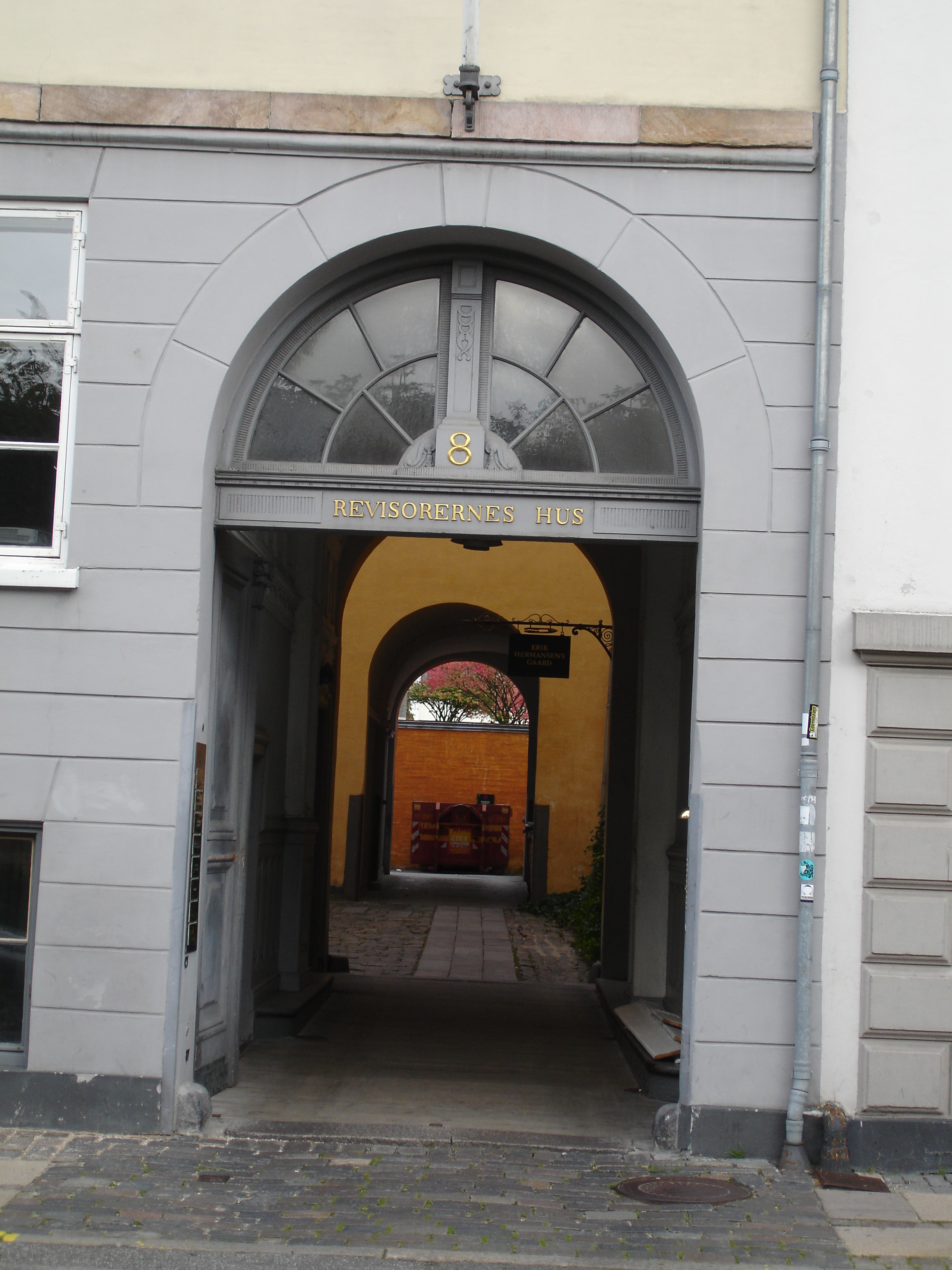 Kronprinsessegade 8, Copenhaga, Dinamarca